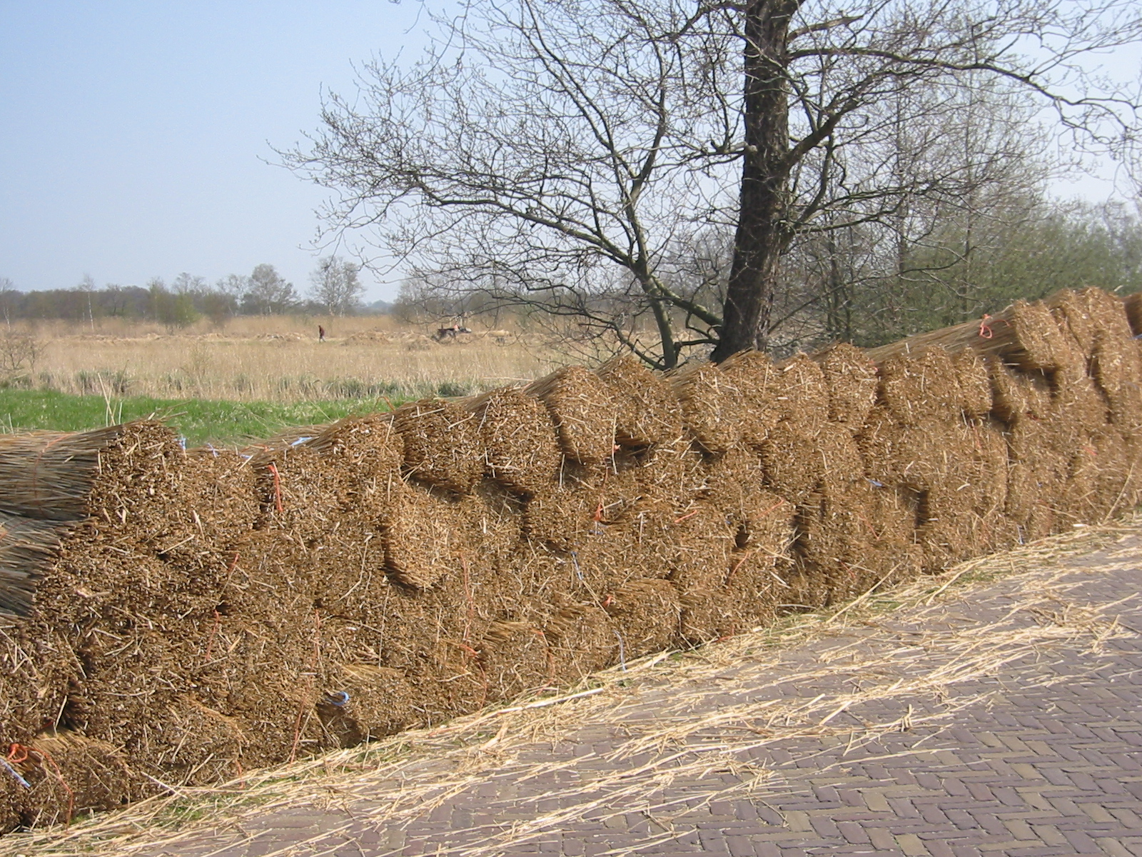 eigen foto. GerardM 15 apr 2004 18:08 (CEST)